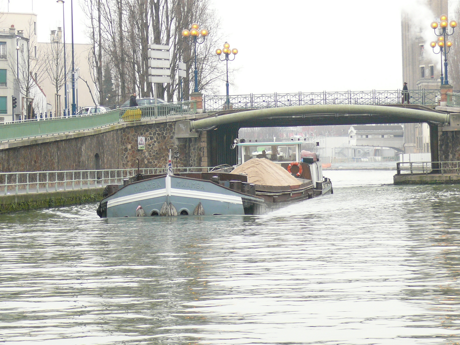 PANTIN : le Canal de l'Ourcq, au niveau du pont de la Mairie : une barge chargée de sable remonte le canal.